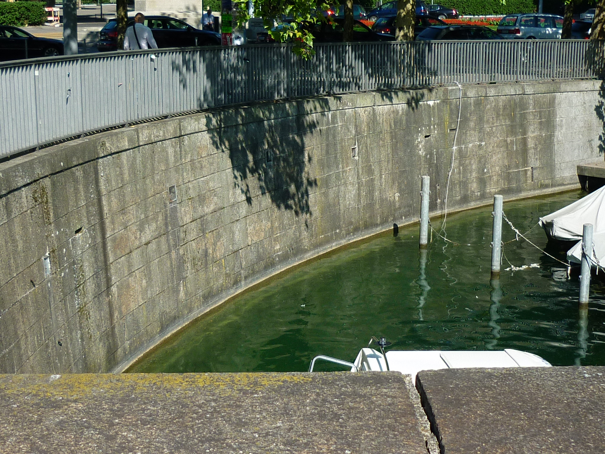 Bunker bei der Limmat Quaibrücke, Zürich, Schweiz, A 4844 Permanente Waffenstellung Quaibrücke – Stadthausquai